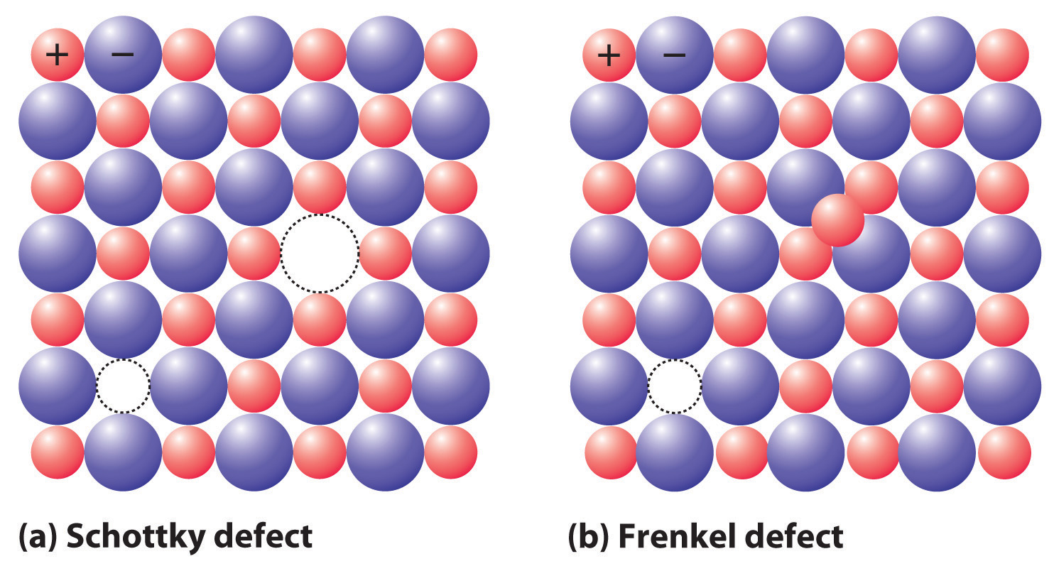 Schottky v frenkel defect